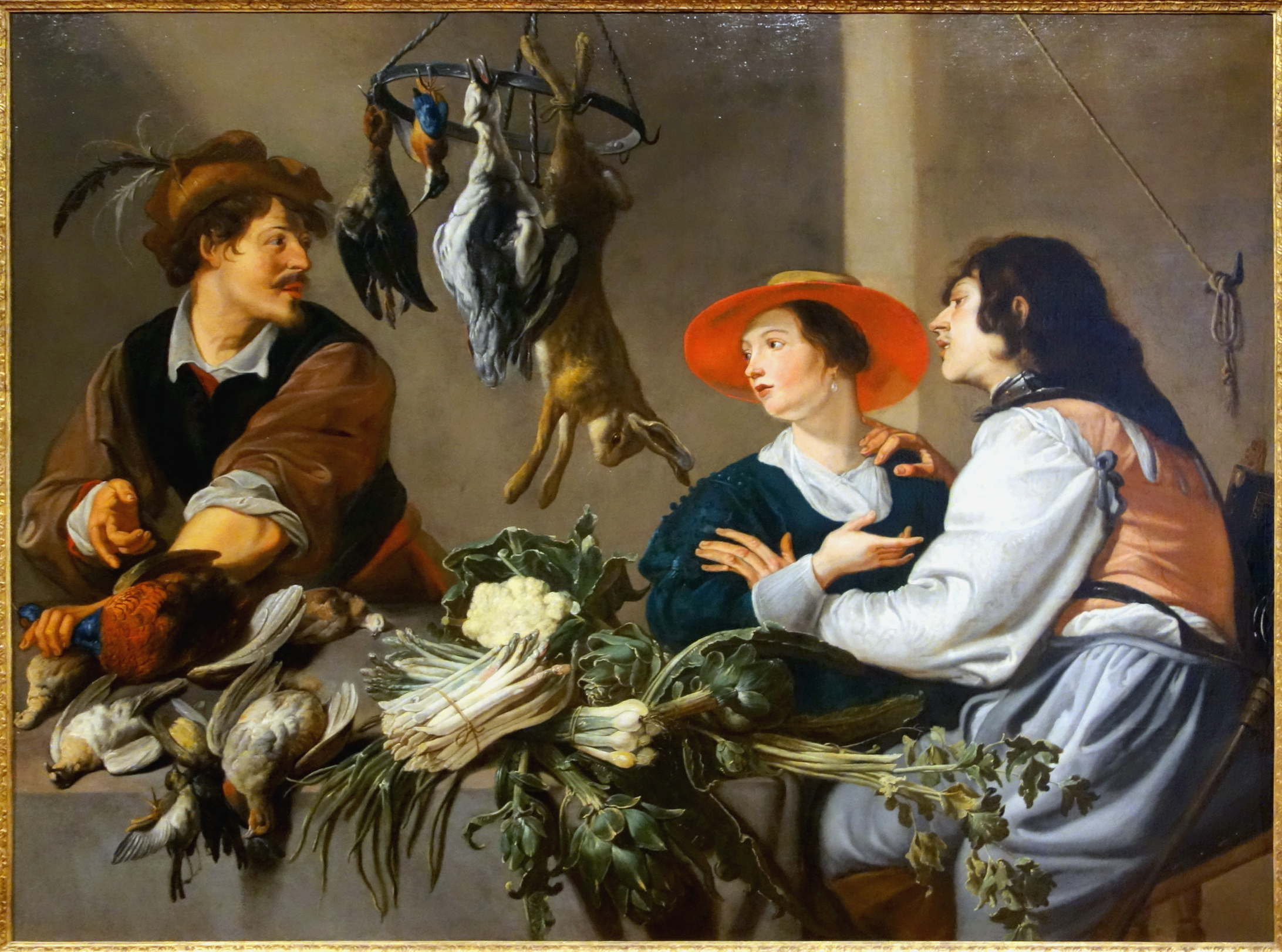 Marchands de gibiers et de légumestitle QS:P1476,fr:"Marchands de gibiers et de légumes" label QS:Lfr,"Marchands de gibiers et de légumes"